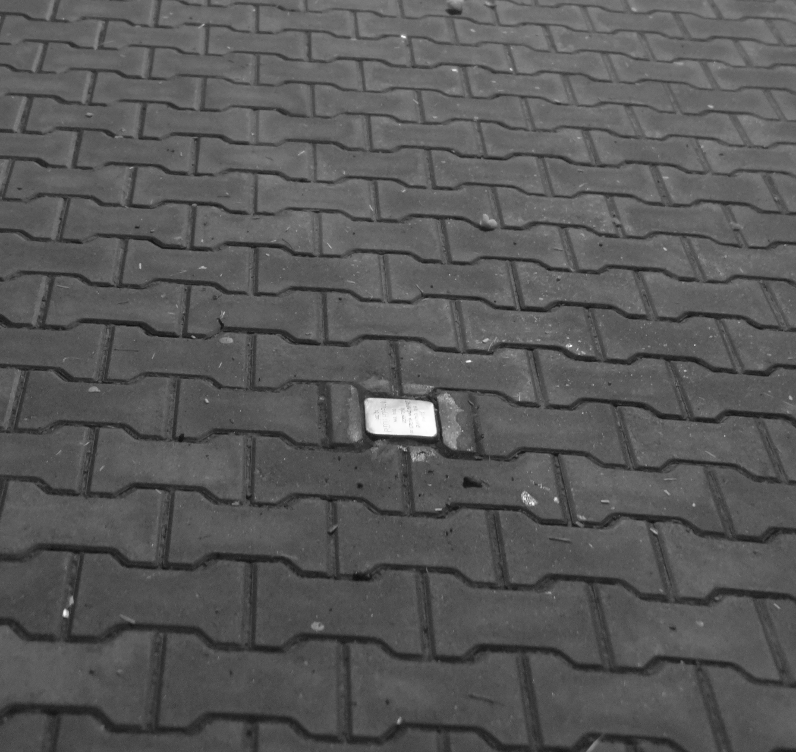 der bisher einzige Stolperstein in Kostelec nad Orlici